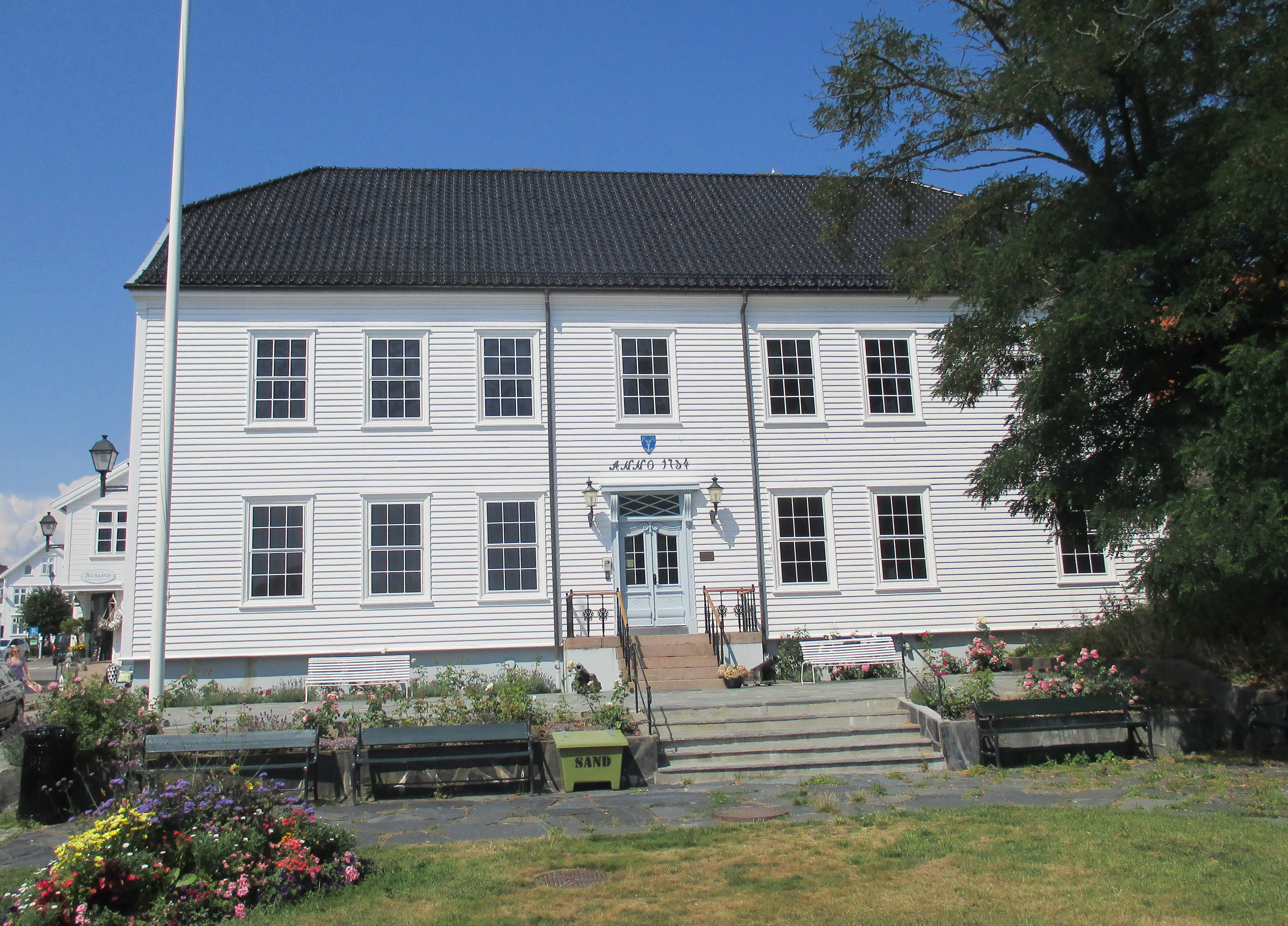 Henschiengården (Lillesand rådhus)